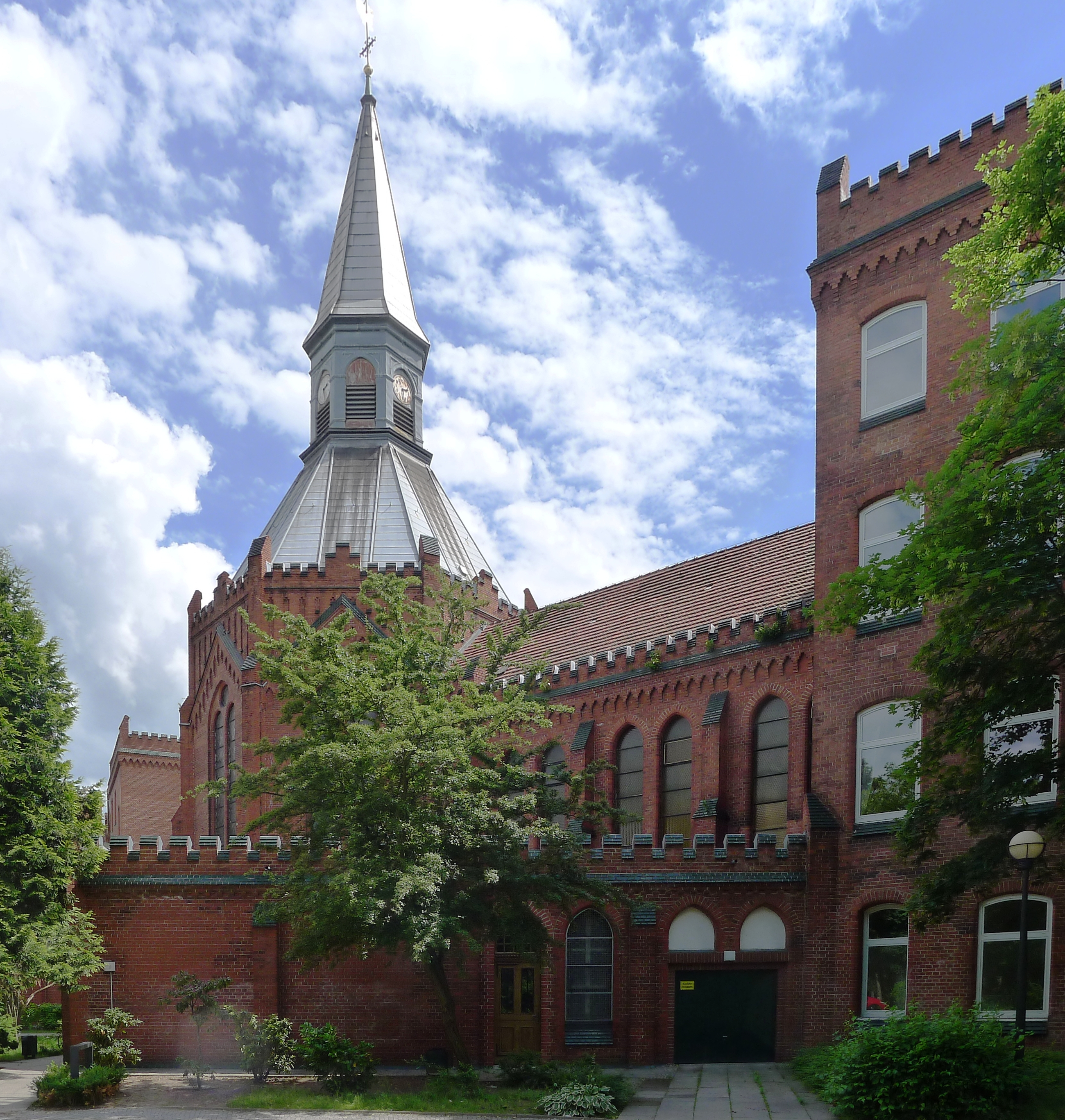 Kirchenschiff zwischen Sanktuarium und Wohngebäude